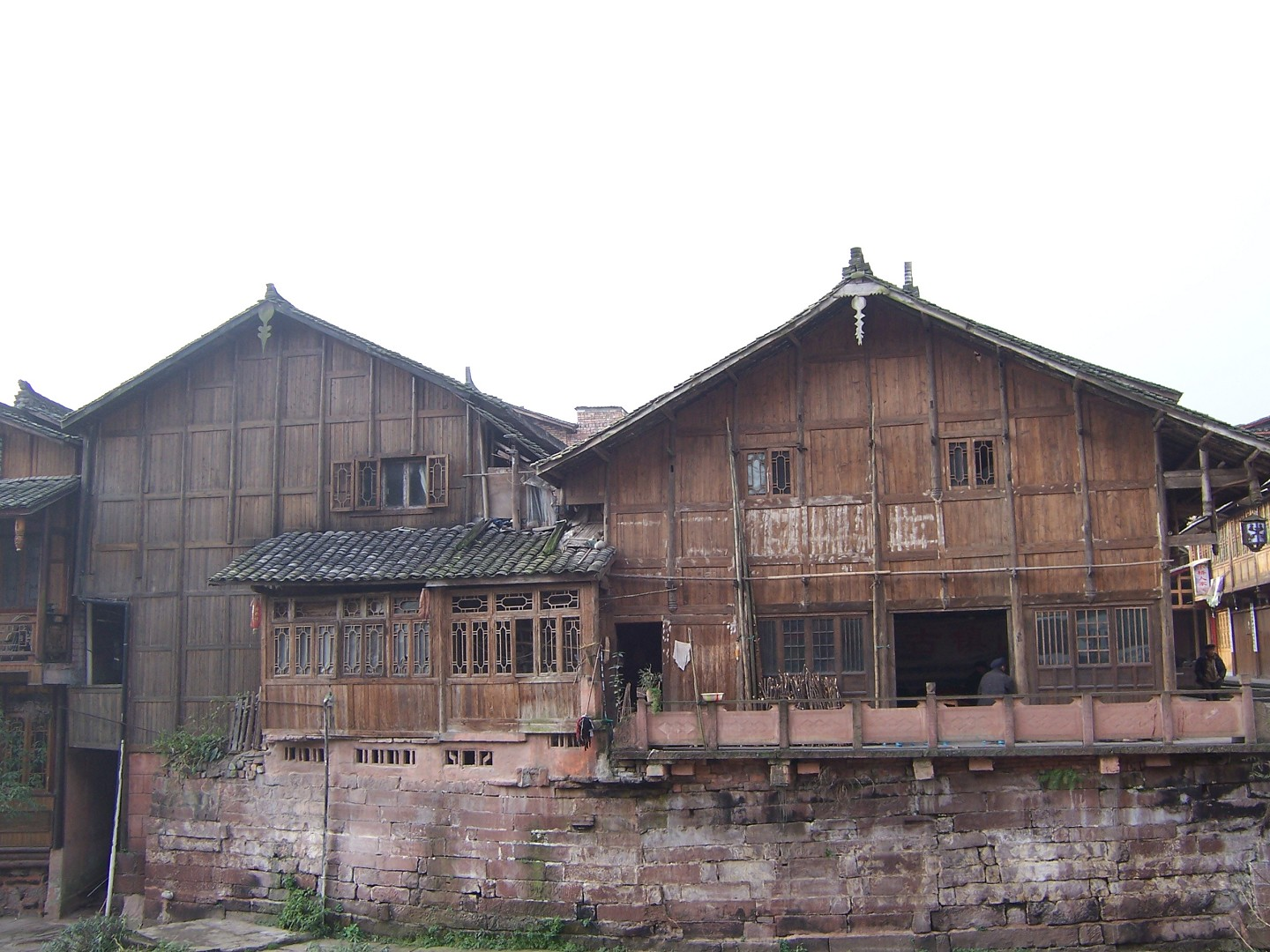 上里古镇1